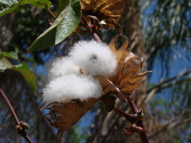 Cotton of Gossypium hirsutum L. - tem como sin. het. Gossypium religiosum L. - MALVACEAE - Parque Olhos D'Água - Brasília - Distrito Federal - Brasil.